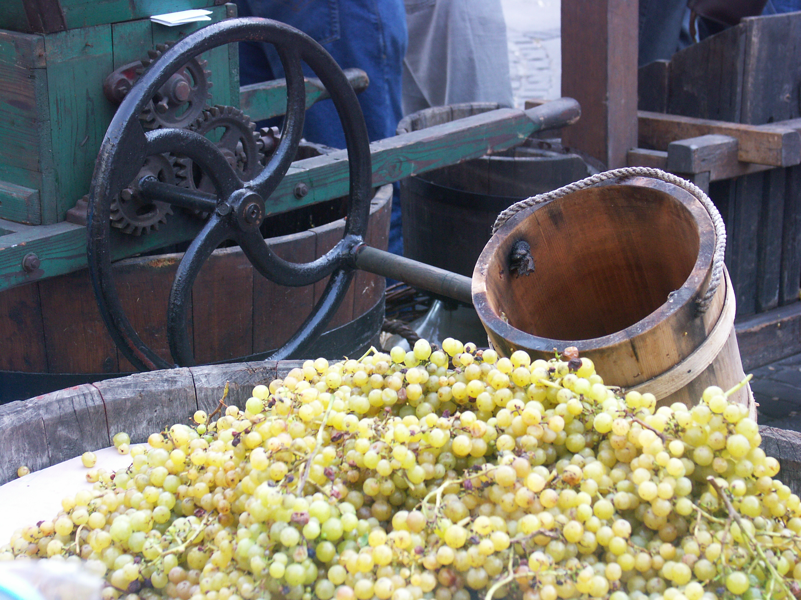 Author: Radovan Bahna, Slovak republic